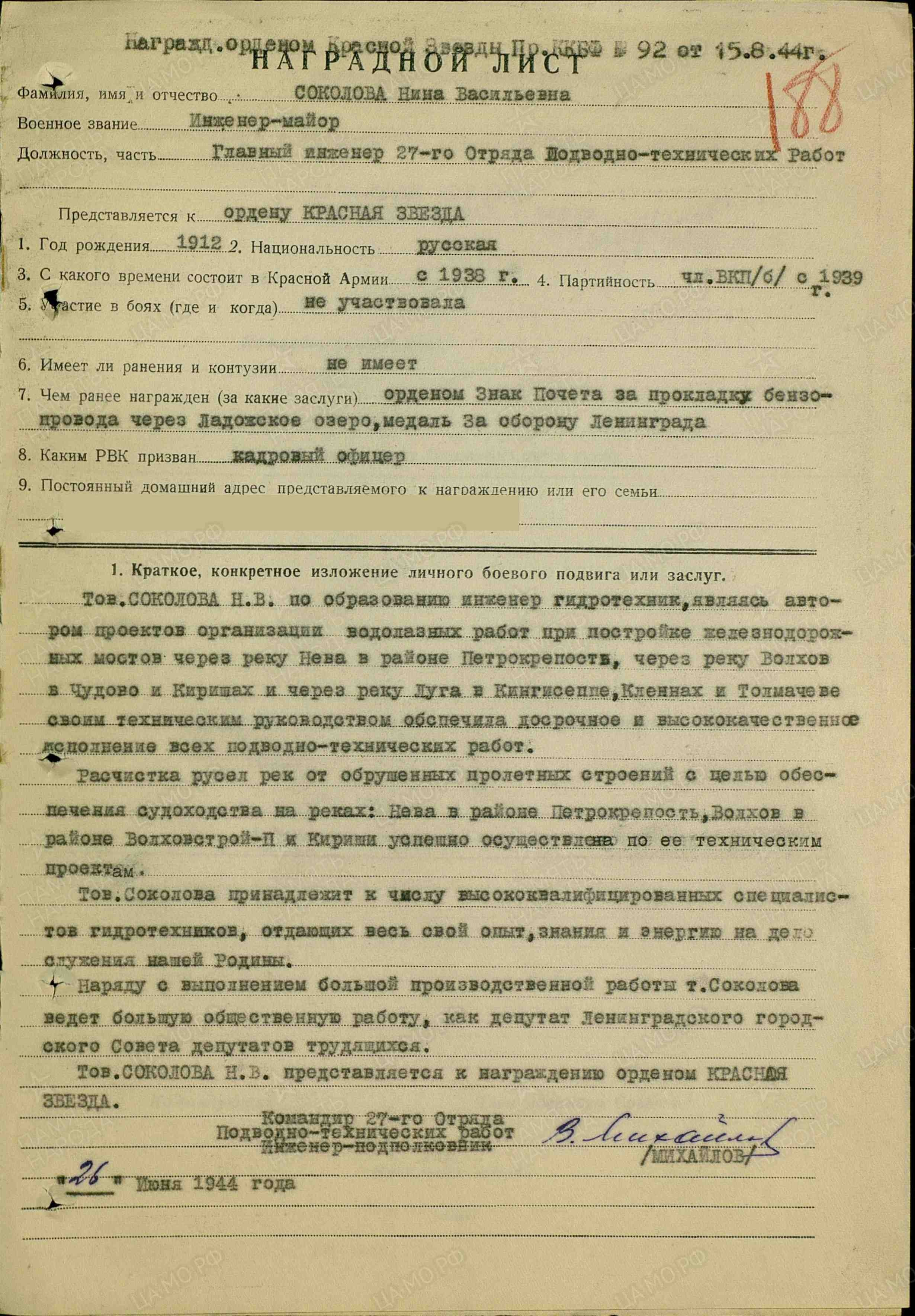 Представление Н. В. Соколовой к ордену Красной Звезды